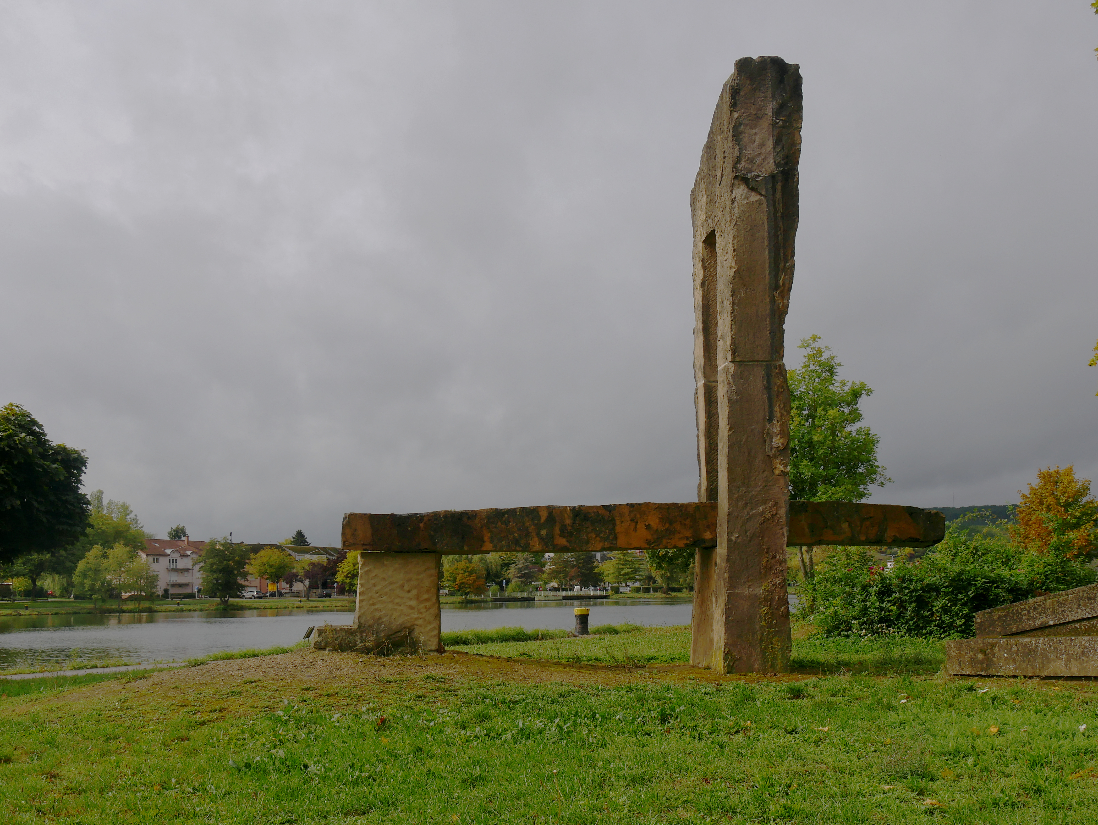 In Palzem an der Mosel in der Nähe des Bahnhofs